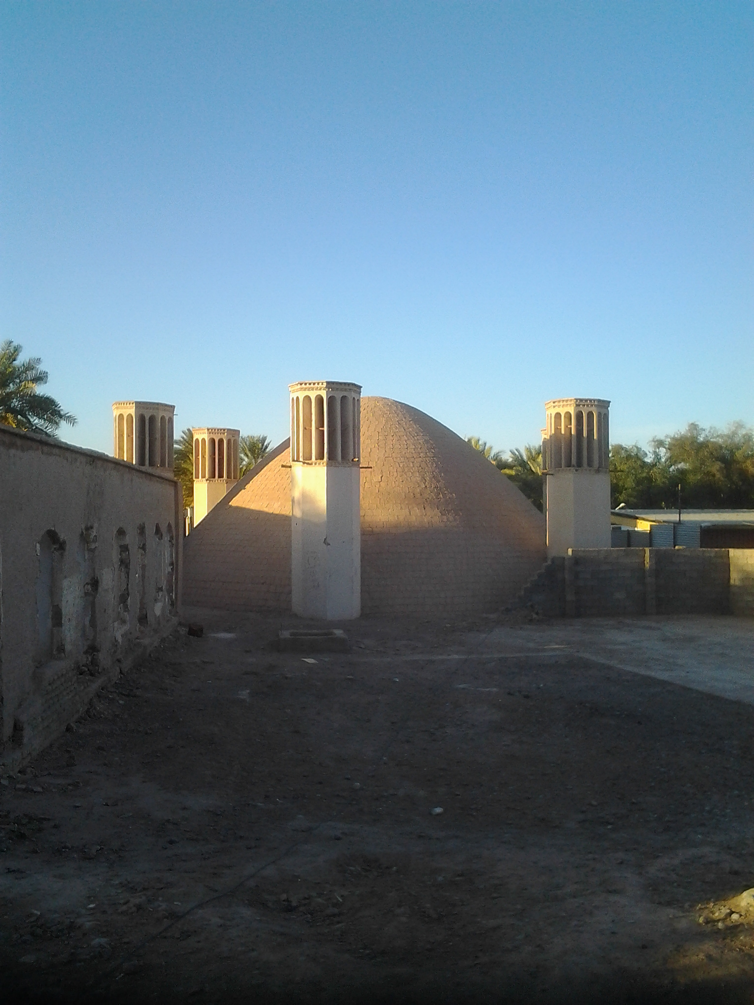 آب انبار حاج محمد تقی در شهداد در استان کرمان